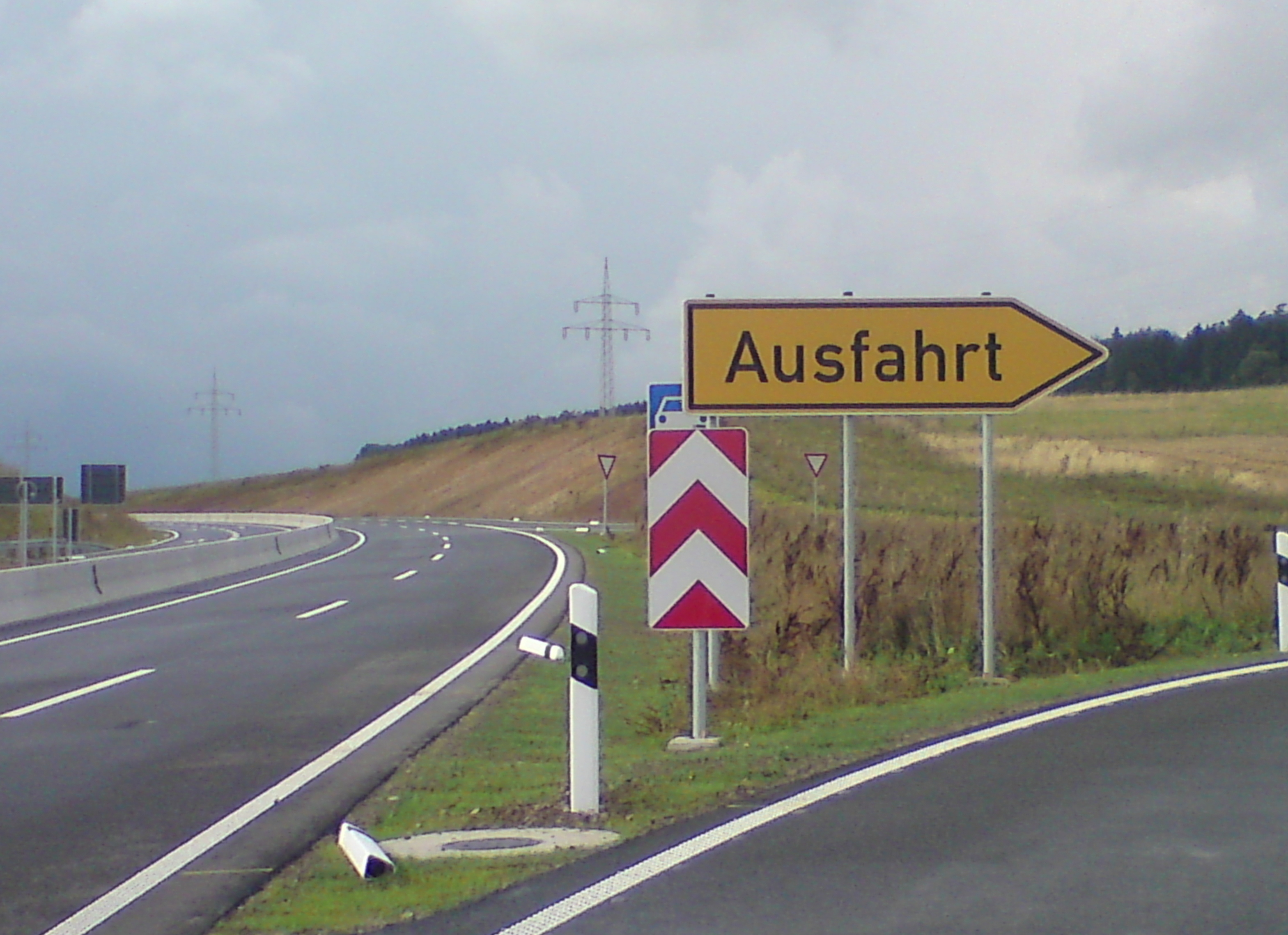 Die B 243 an der AS Steina/Bad Sachsa-West, Blick in Fahrtrichtung Osterode